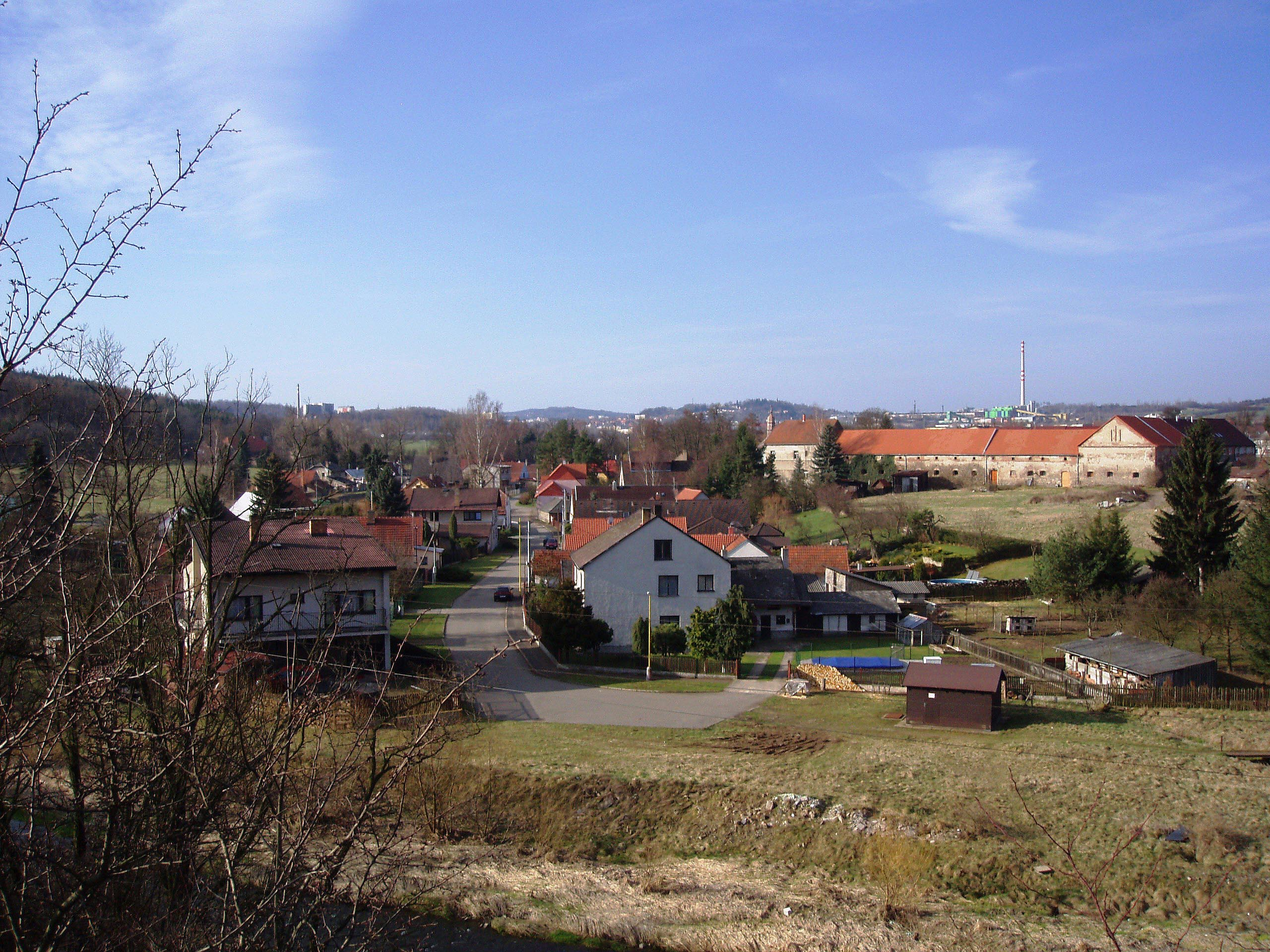 Trhové Dušniky - celkový pohled